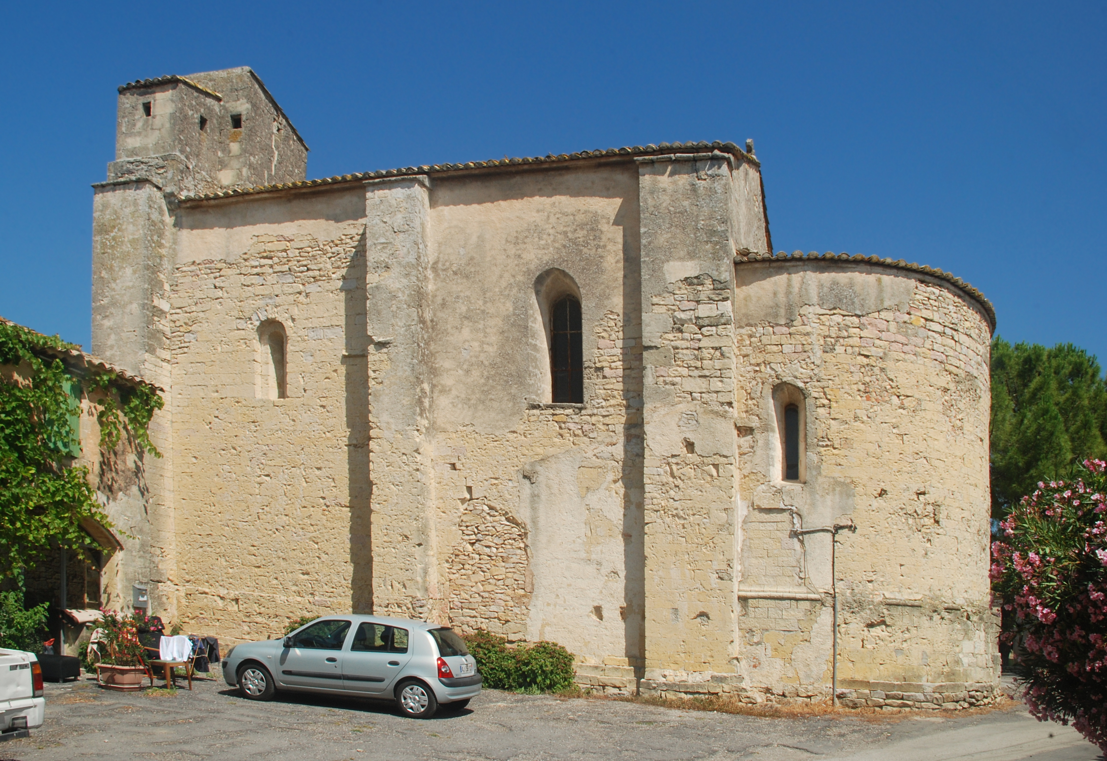 France - Gard - Église de Saint-Étienne d'Escattes